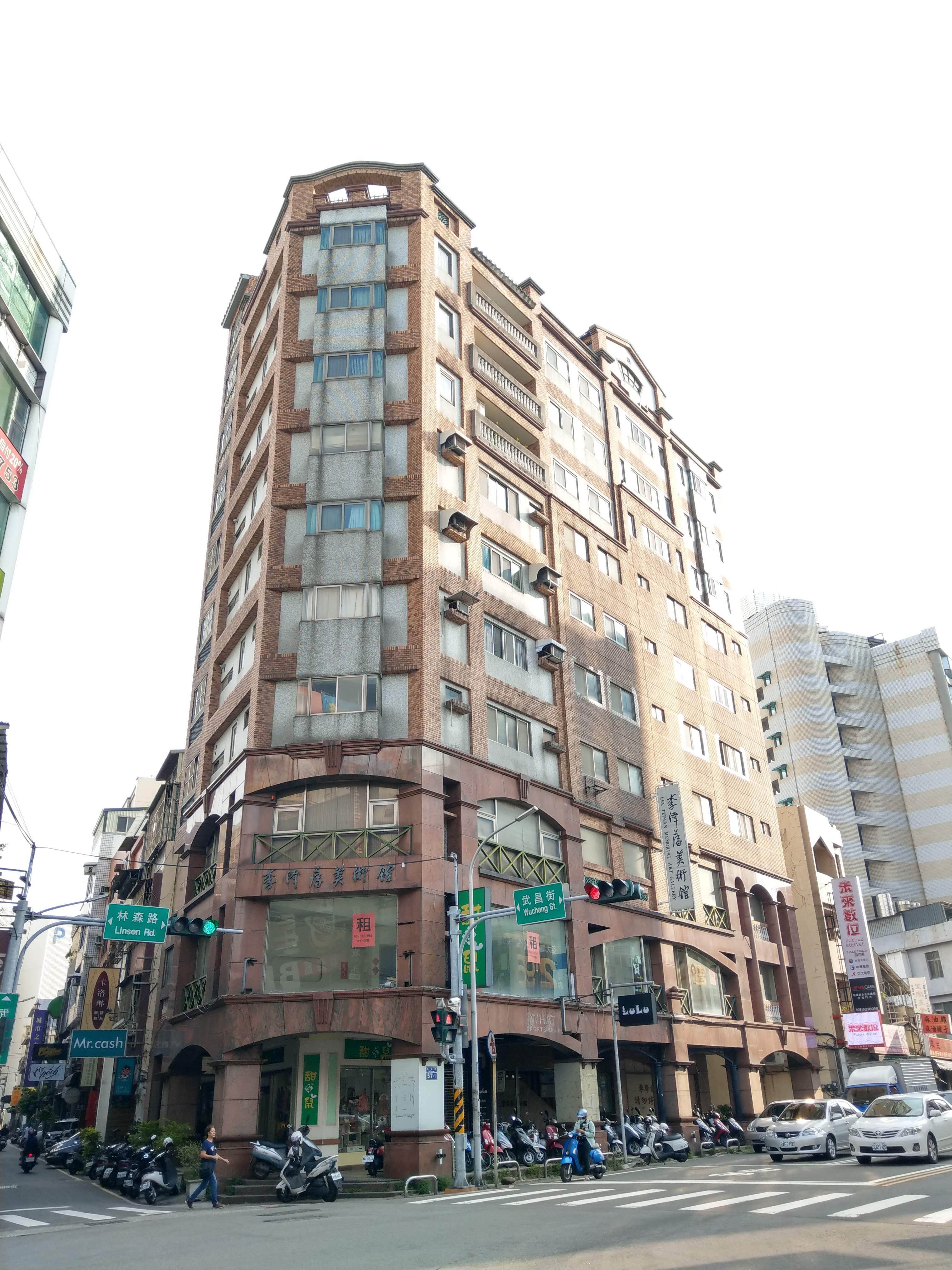 李澤藩美術館